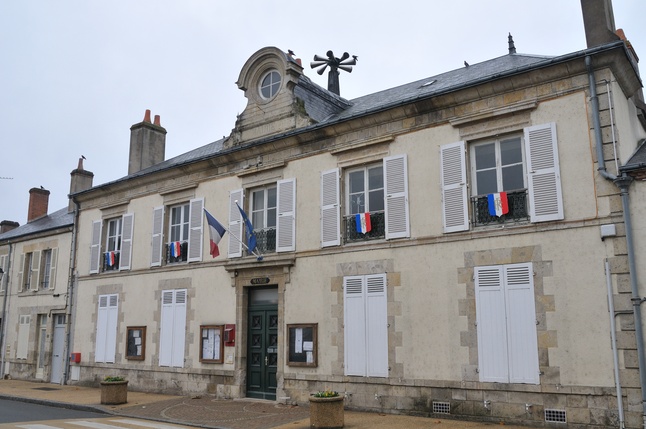 Mairie, Fay-aux-Loges, Loiret, France